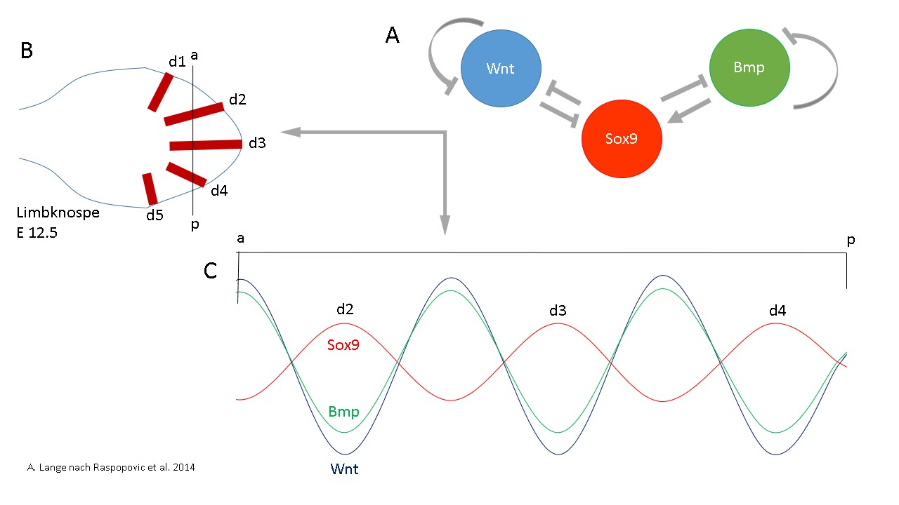 BSW-Modell